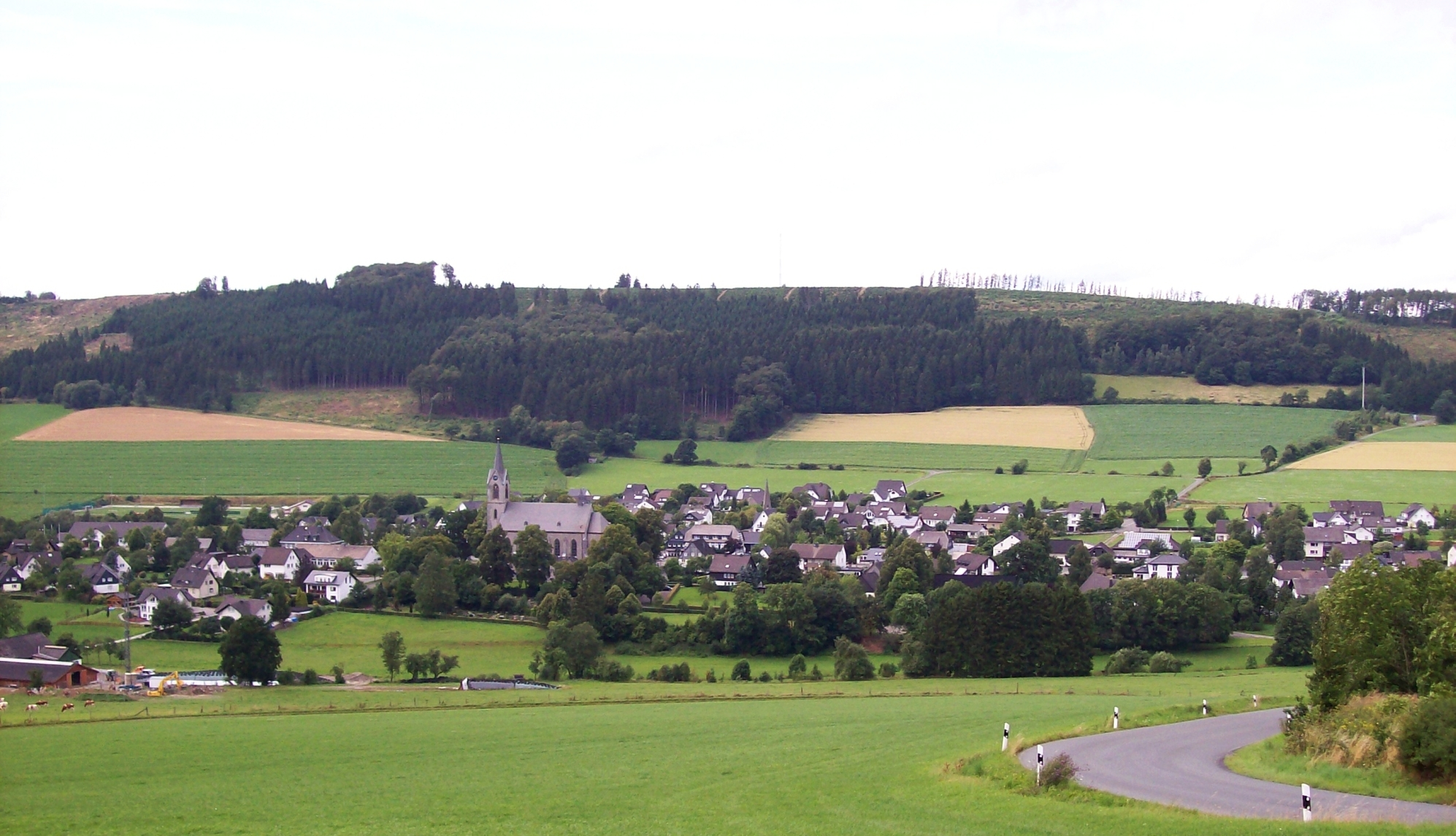 Eslohe-Reiste (Germany)